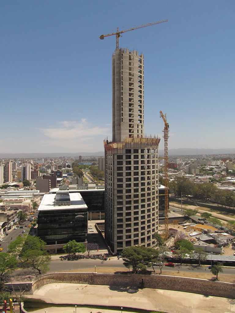 Torre Capitalinas Radisson en Octubre de 2013